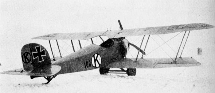 Niemiecki samolot szkolny Kondor B.I